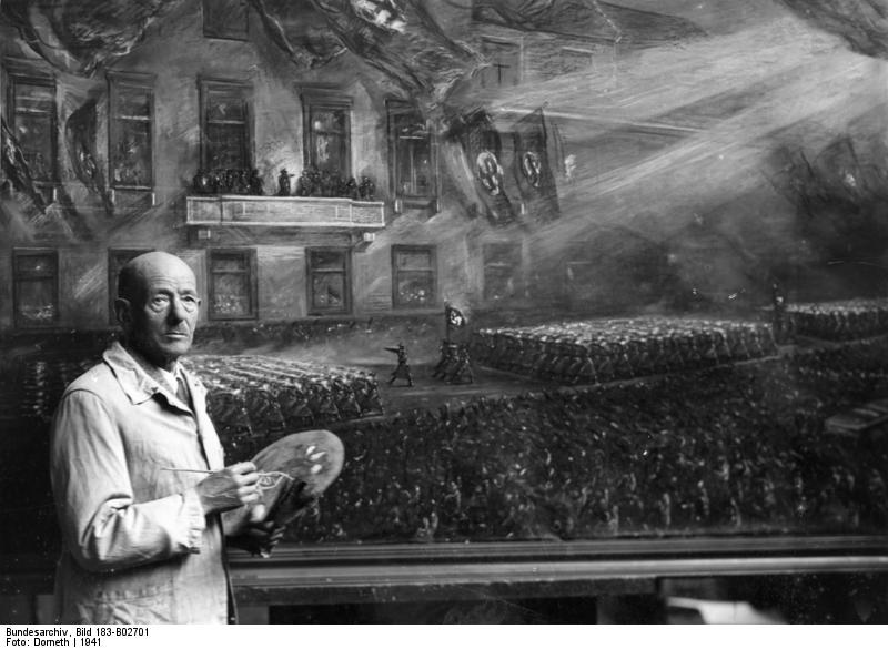 Ludwig Dettmann Scherl: Der Maler Prof. Ludwig Dettmann Fot. Dorneth 10.5.41 [Ludwig Dettmann (Porträt) mit Palette vor einem seiner Gemälde] Abgebildete Personen: Dettmann, Ludwig Prof. Dr.: Maler, Deutschland (GND 116086483)